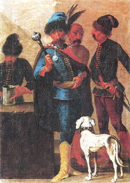 Ismeretlen magyar festő: Kuruc katona buzogánnyal